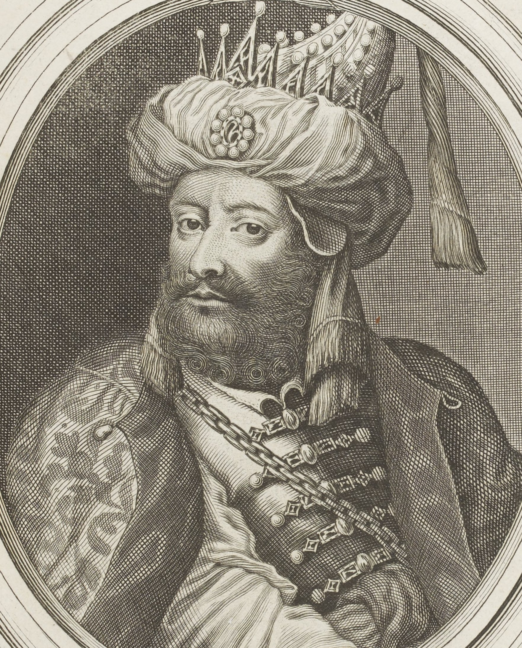 Les augustes représentations de tous les rois de France, depuis Pharamond jusqu'à Louis XIV,... avec un abrégé historique sous chacun, contenant leurs naissances, inclinations et actions plus remarquables pendant leurs règnes